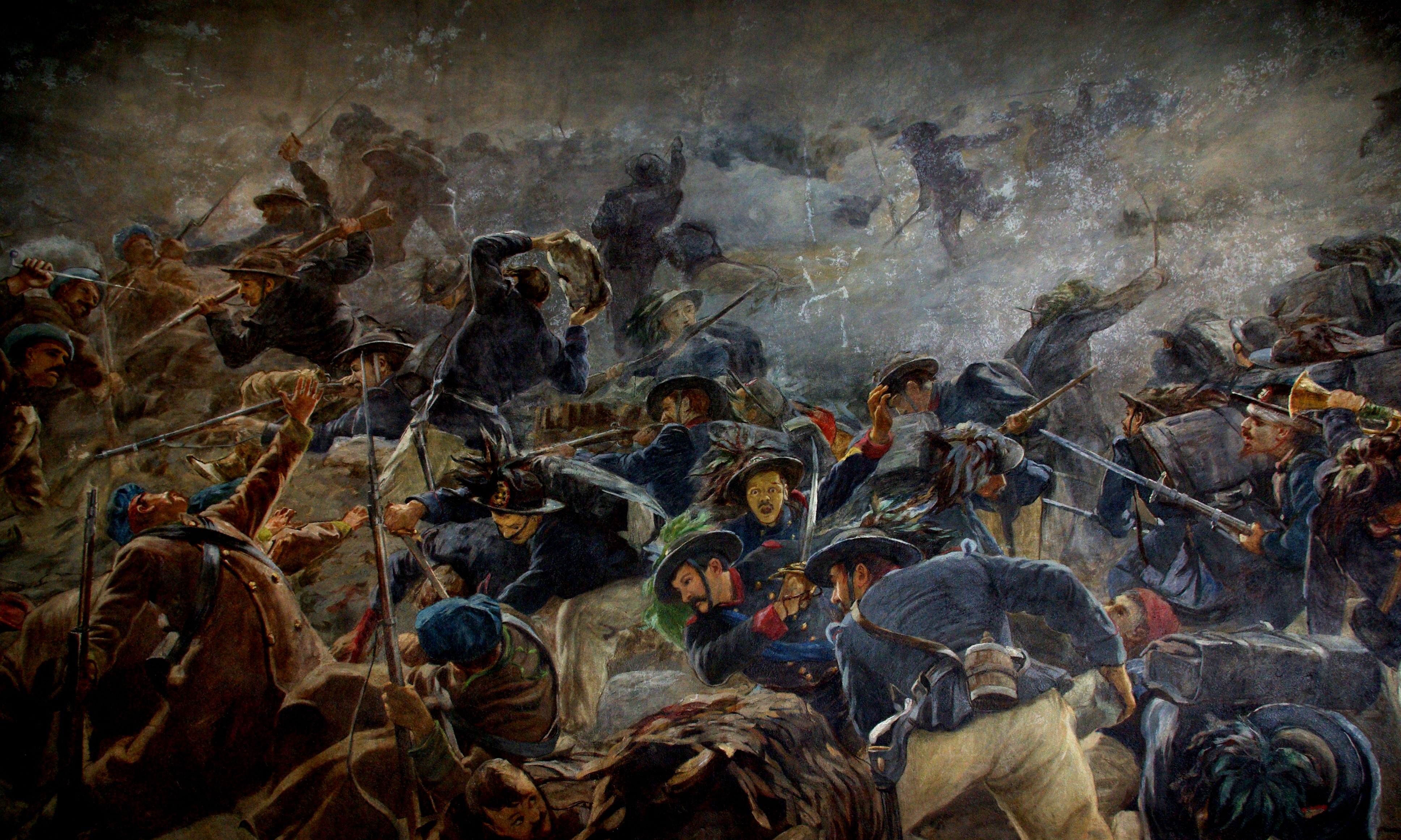 Ausschnitt eines Freskos im Turm von San Martino della Battaglia